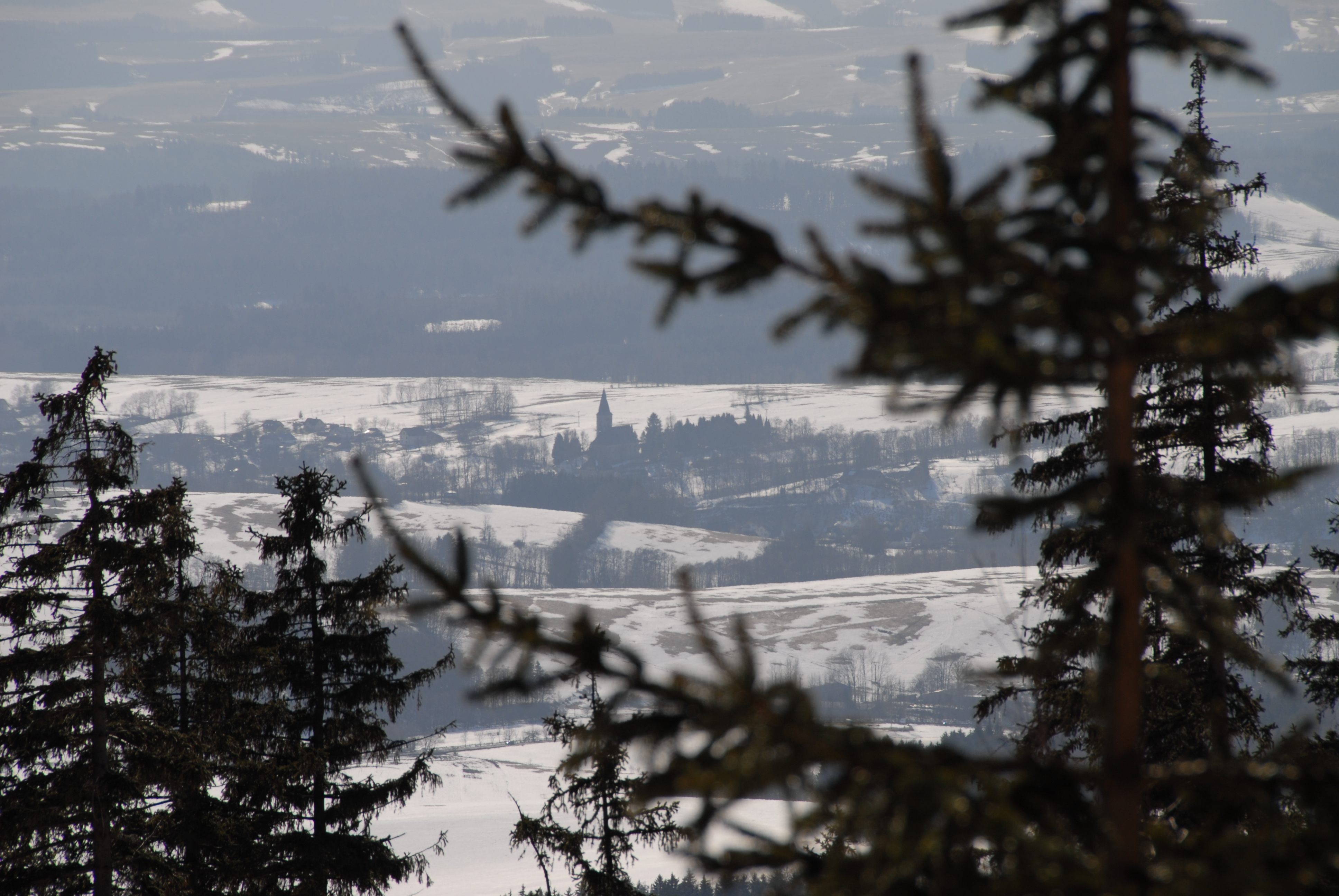 Pohled na kostel sv. Jakuba Většího v Dolním Lánově z modré turistické trasy na úbočí Černé hory (1299 m.n.m.)